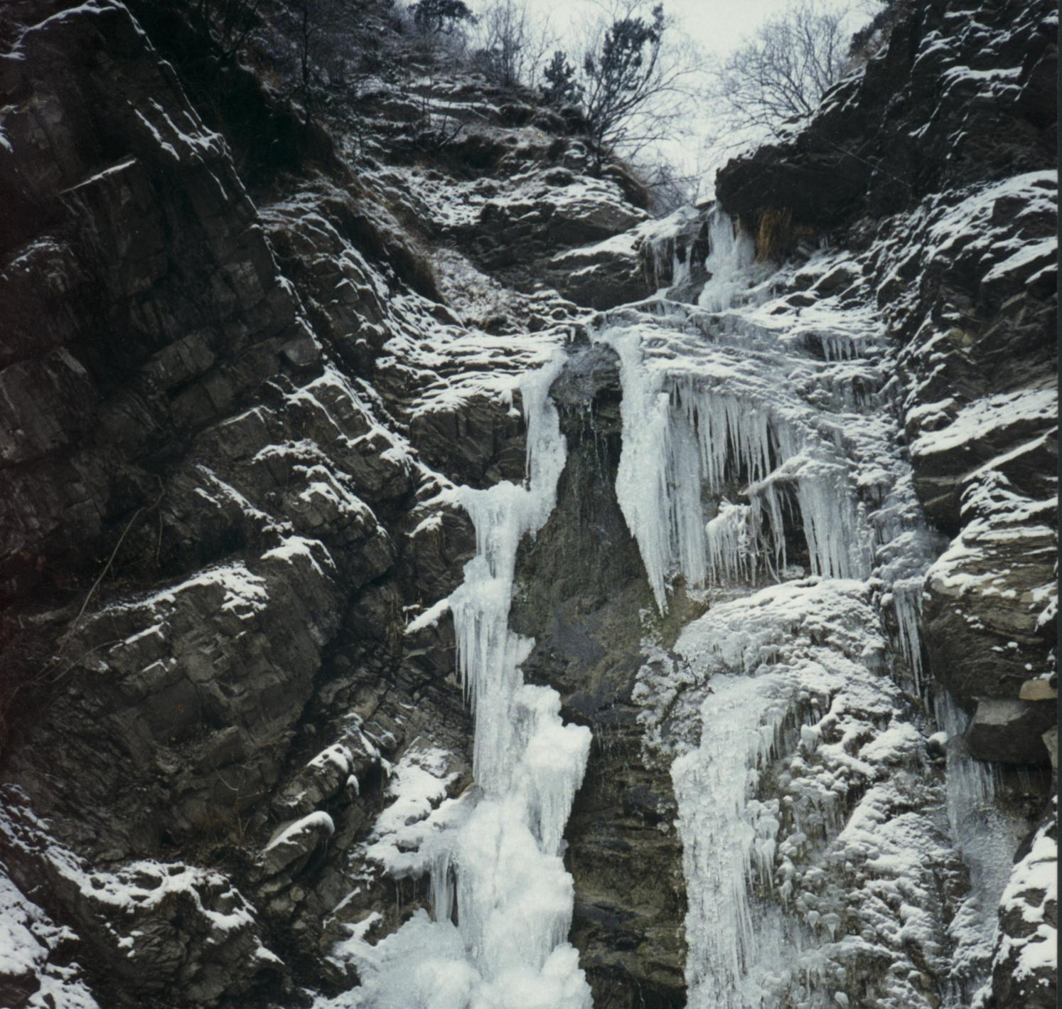 Fin Décembre 1996 : cascade de la fontaine ardente partiellement gelée. Mont Saint-Eynard. Chartreuse. Isère.